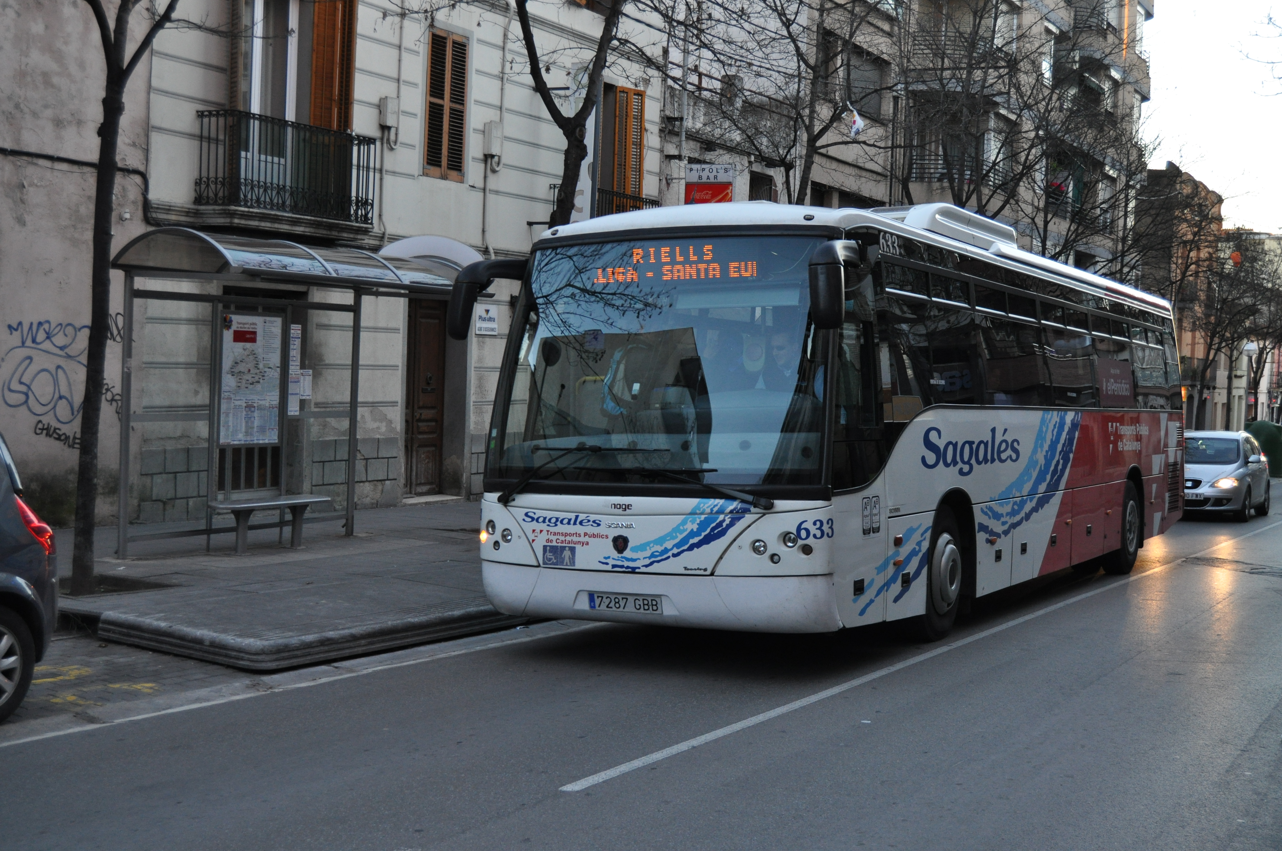 Mollet del Vallès: Parada de autobús de Jaume I en sentido Parets del Vallès, donde vemos un autobús a Riells.